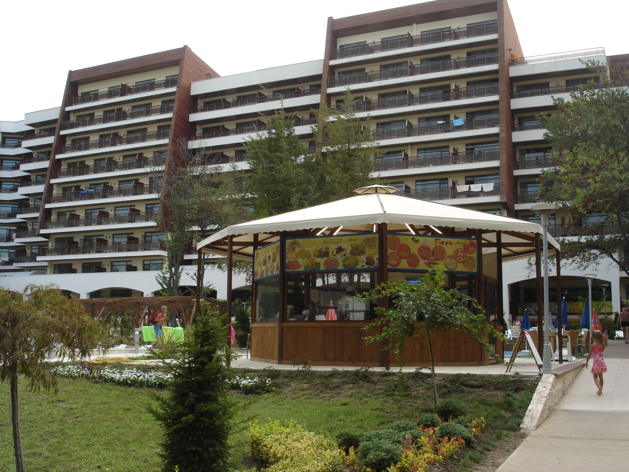 Hotel Flamingo, Albena, Bulgaria